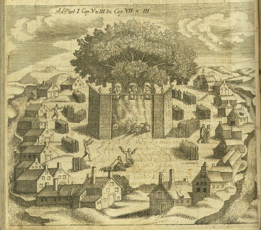 Ancient Romuva